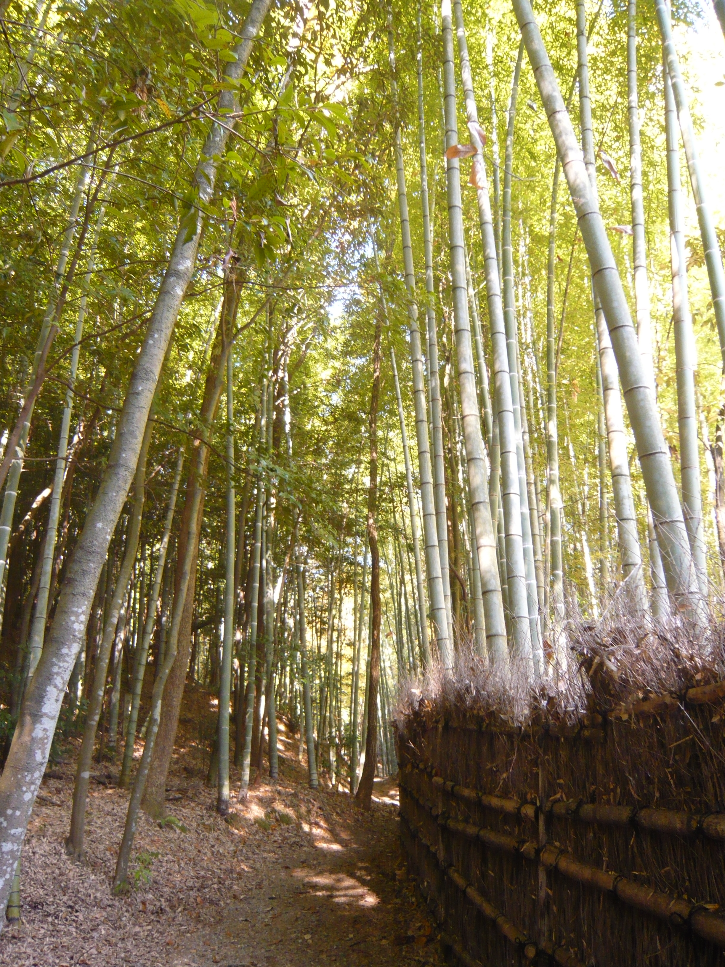 Enku Museum 関市円空館までの山道（関市円空館）,Seki,Gifu,Japan（岐阜県関市）で撮影。